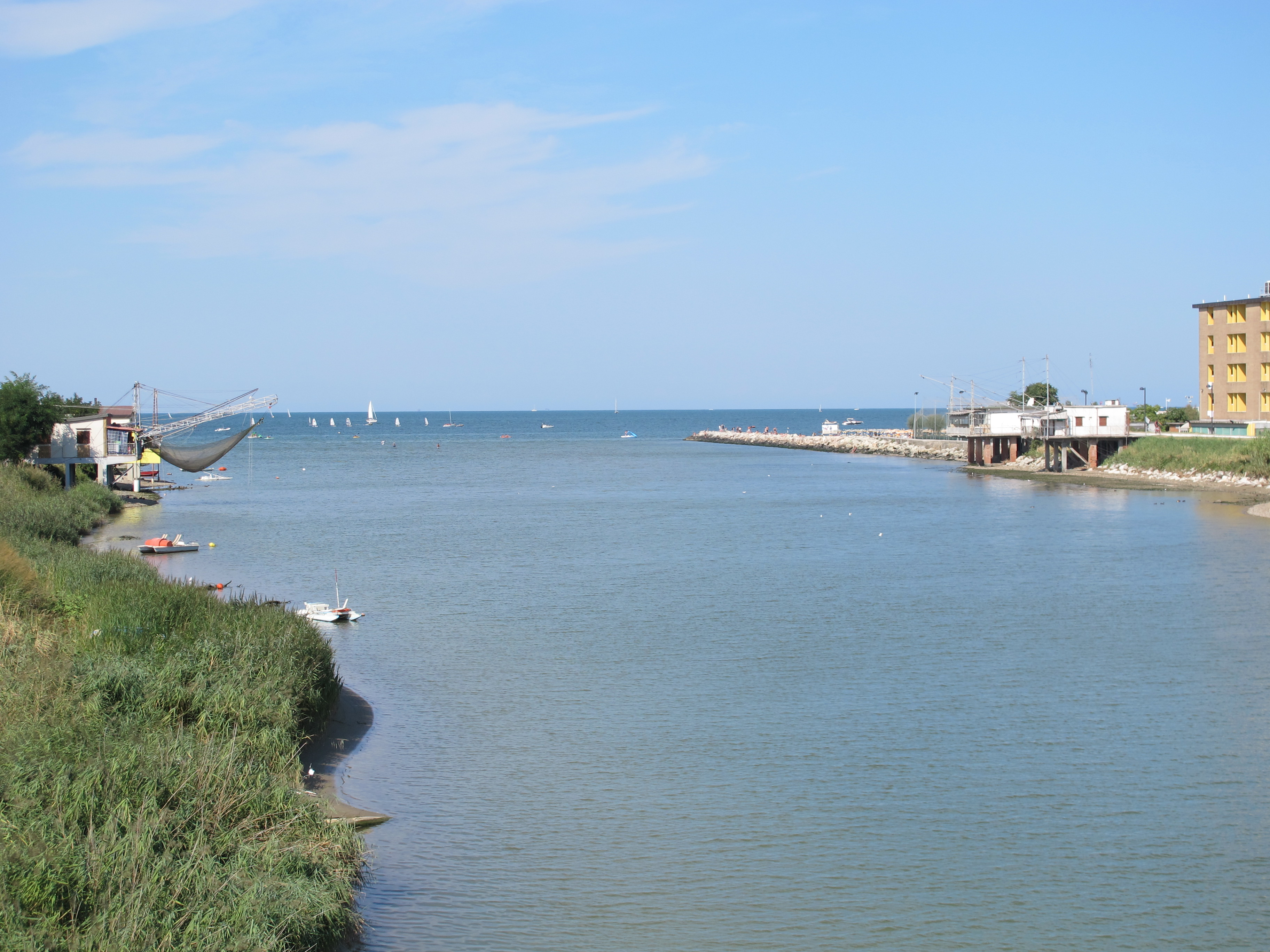 La foce del fiume Marecchia a Rimini, tra le frazioni di San Giuliano e Rivabella.